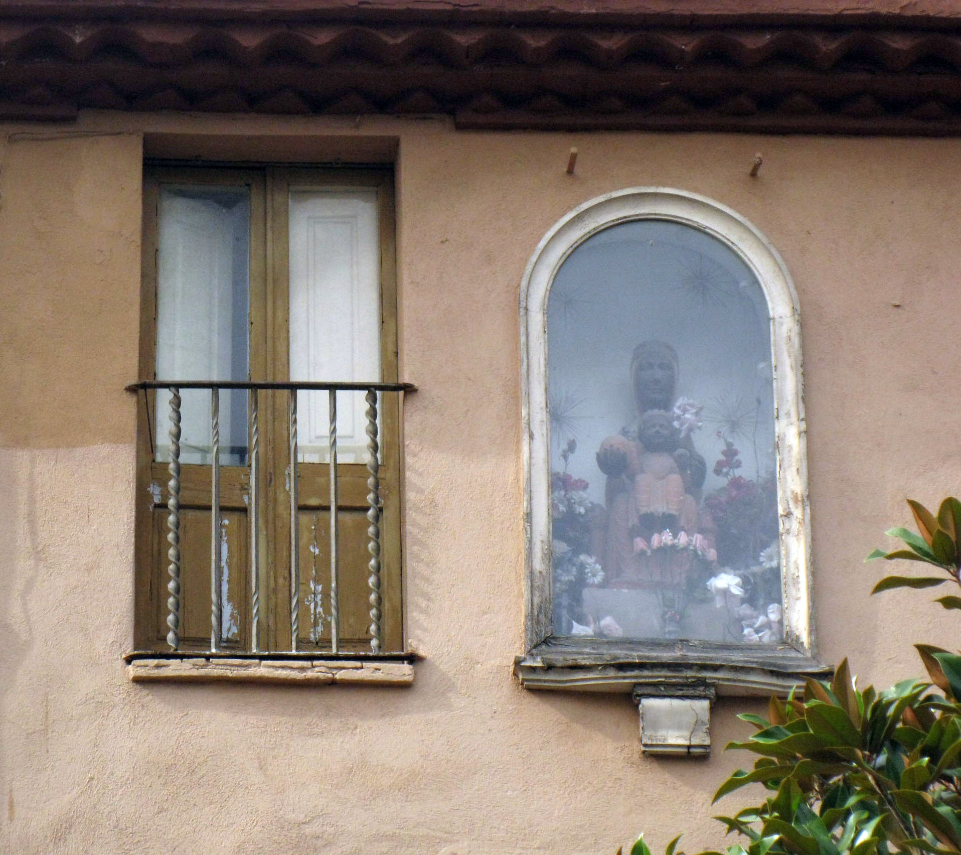 Casa Gros, al Raval de Montserrat núm. 24-26 (Terrassa), de mitjan segle XVIII. Detall de la façana, amb un balcó i una capelleta de la Mare de Déu de Montserrat.